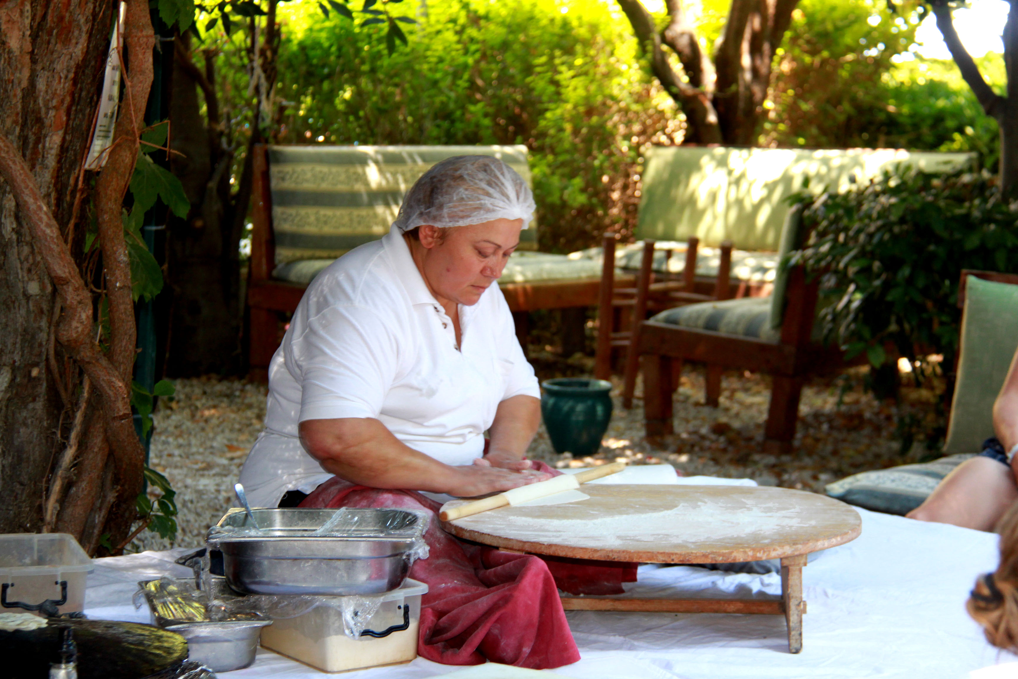 Женщина делает турецкие лепёшки